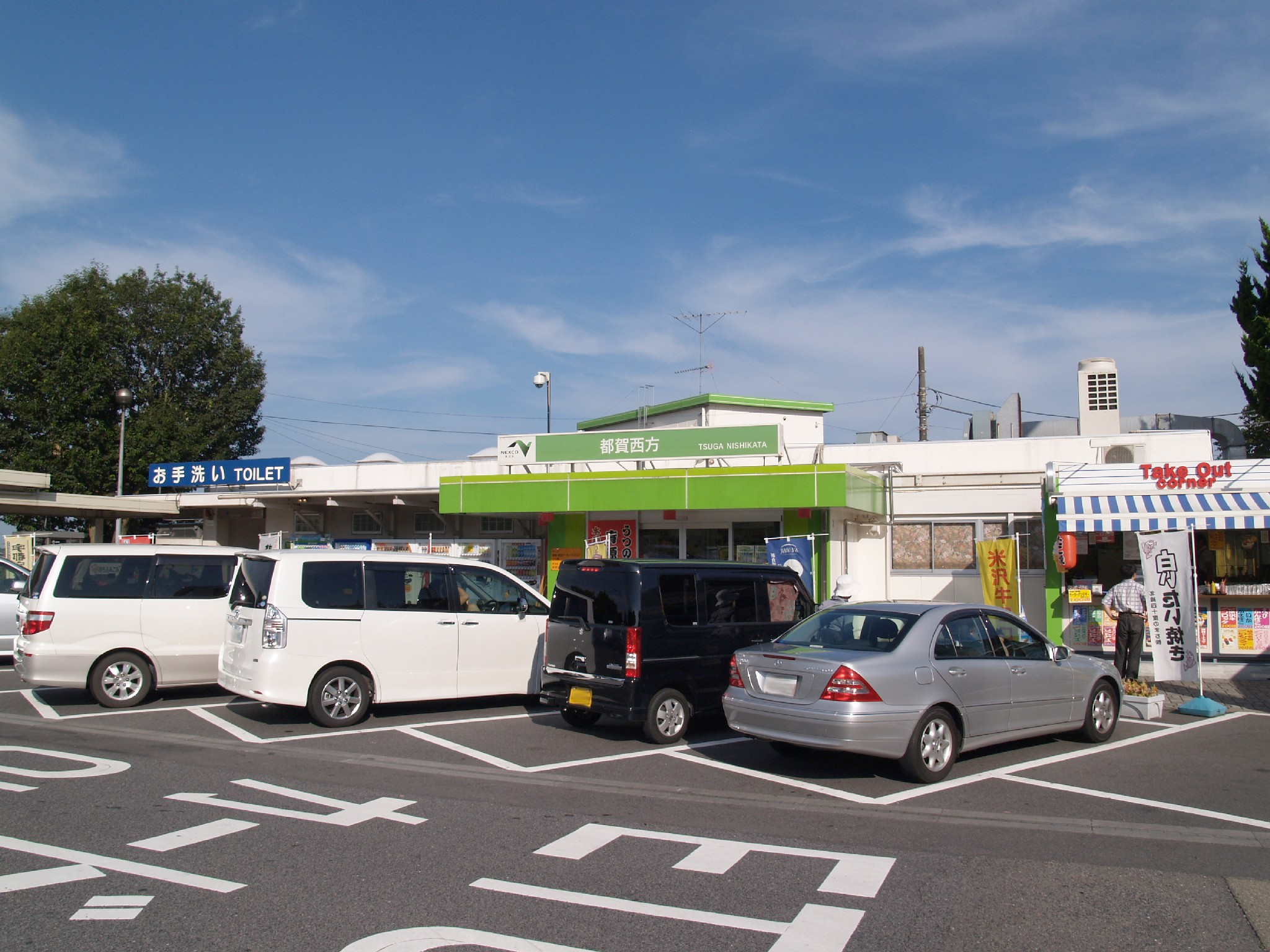 都賀西方パーキングエリア上り線施設